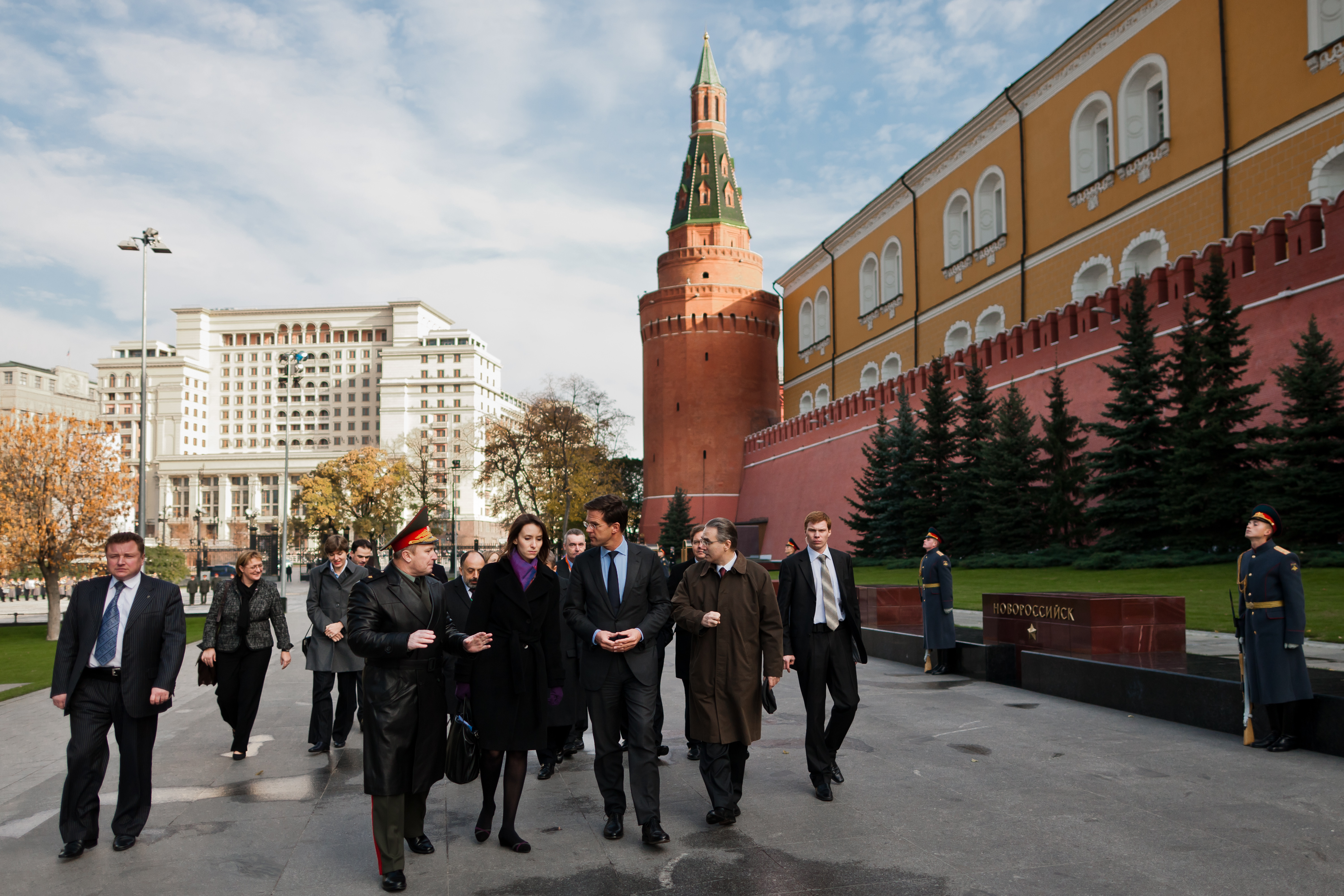 Minister-president Rutte passeert het Kremlin op weg naar zijn ontmoeting met president Medvedev. Lees meer over het bezoek aan Rusland